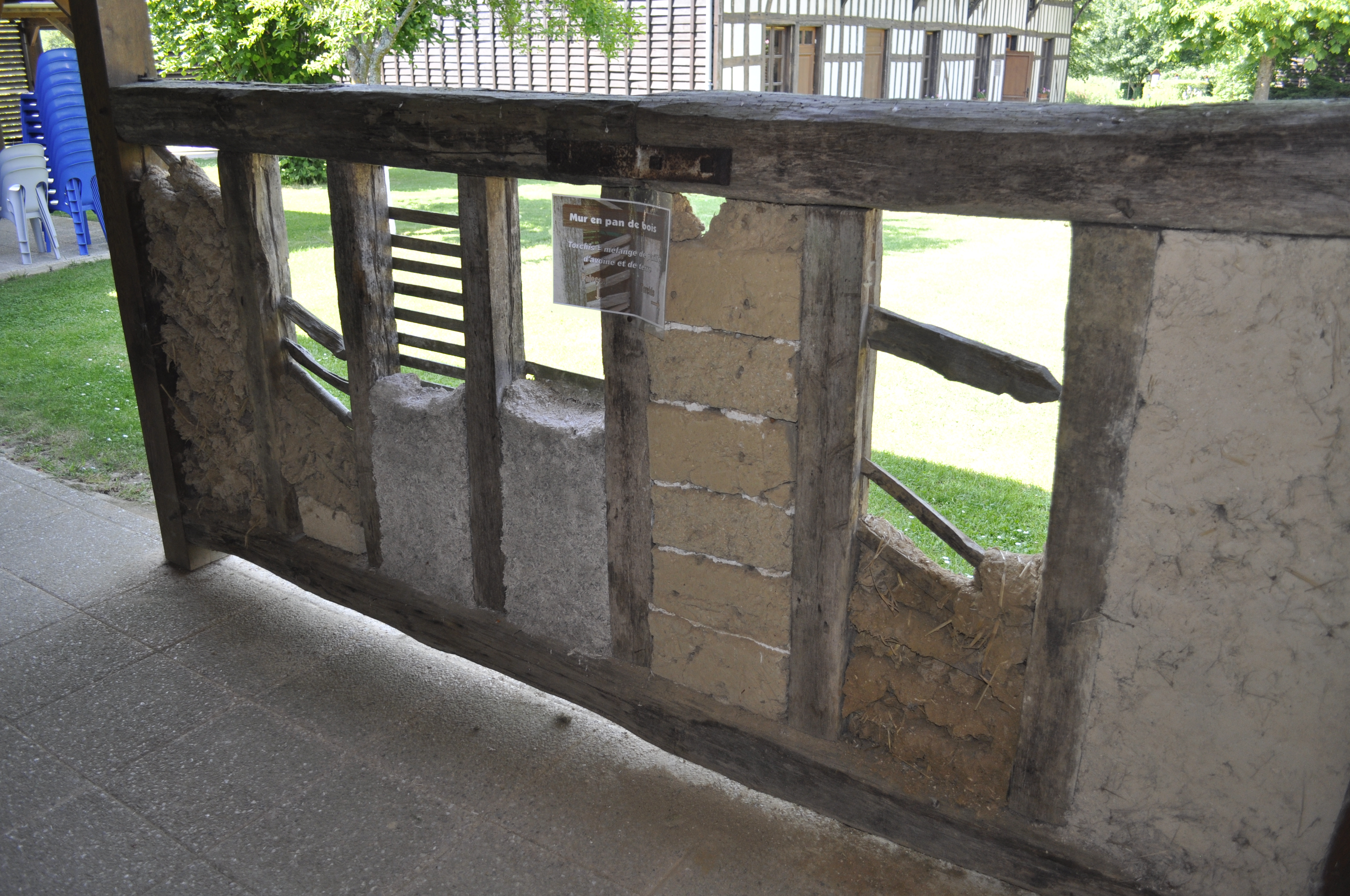 Musée du lac du Der à sainte Marie du lac-Nuisement (Haute-Marne). Reconstitution d'un mur en torchis.